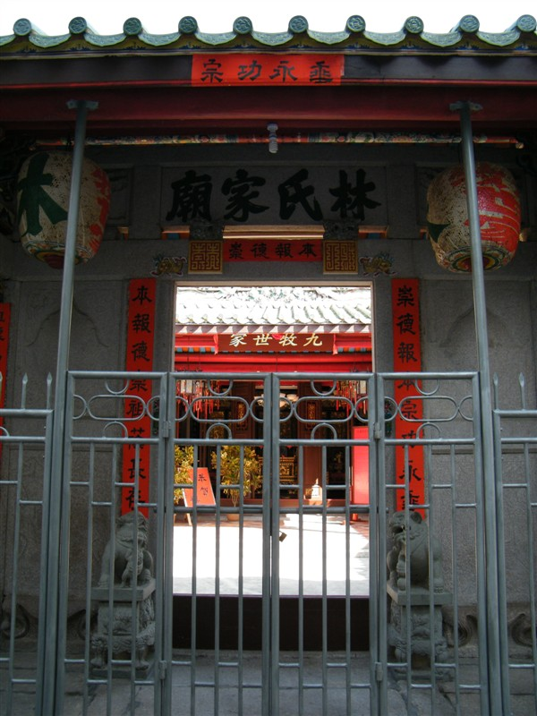 赤港林氏家庙——九牧世家